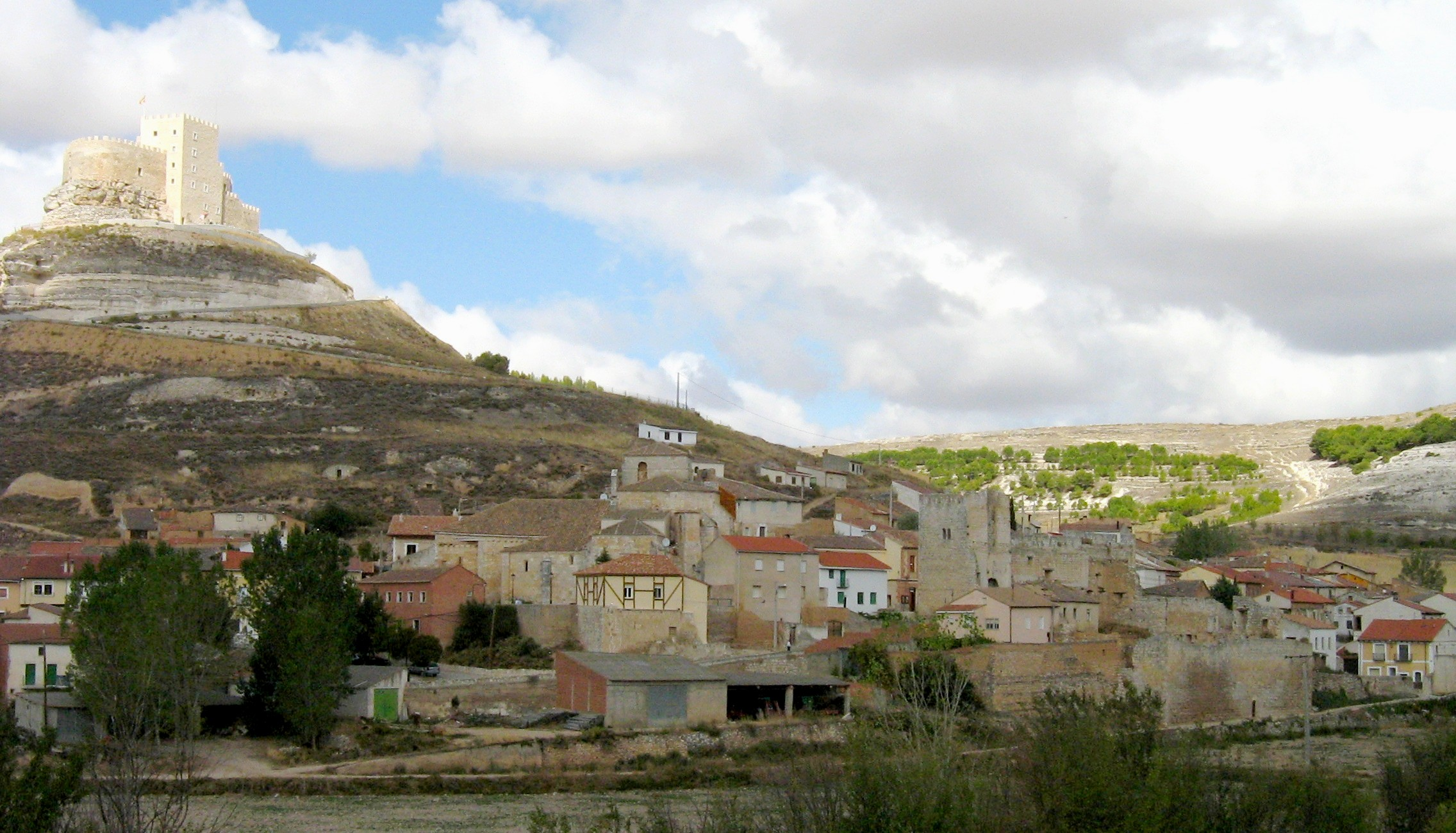 Curiel de Duero. Castillo. Palacio Zúñiga. Valle del Cuco. Valladolid. Ribera de Duero